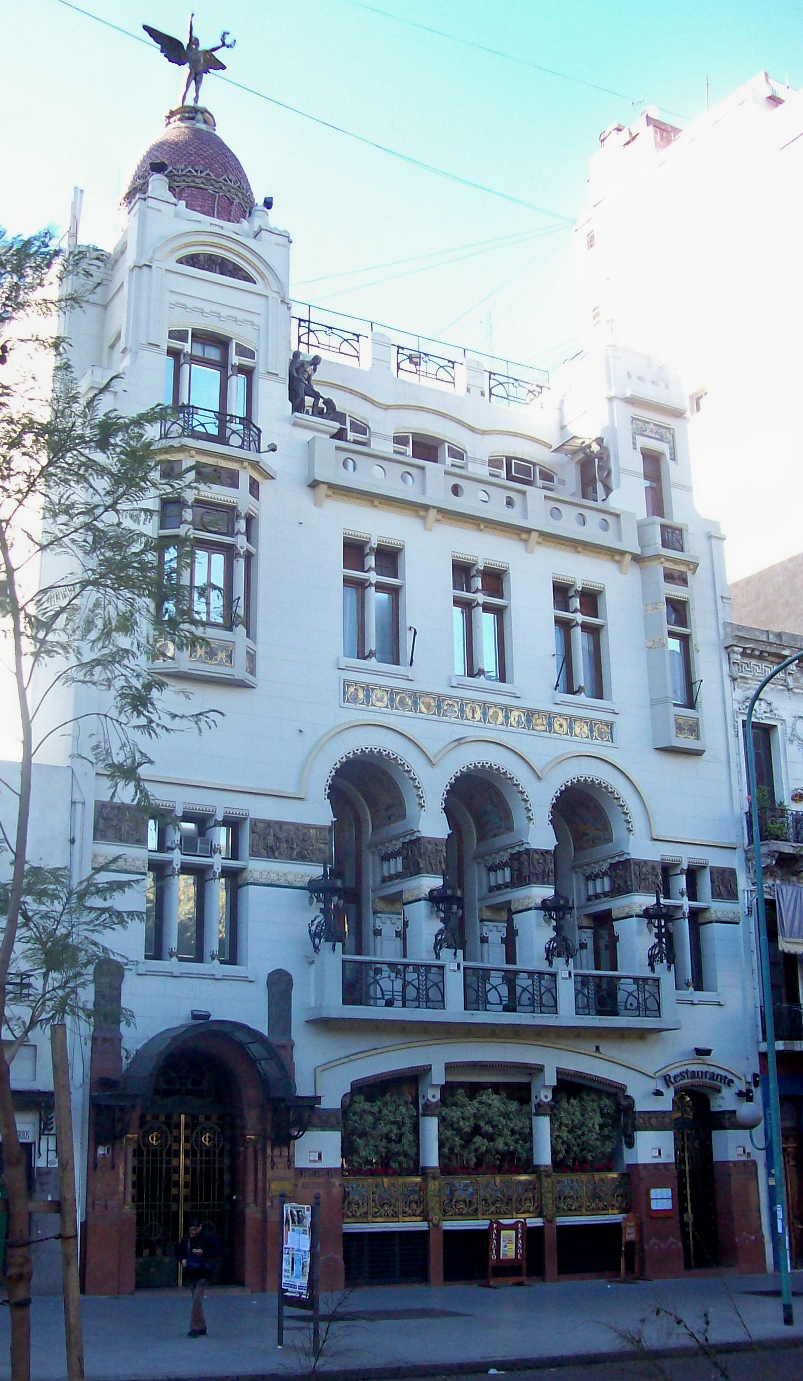 Frente del edificio del Club Español, en Bernardo de Irigoyen 176, Buenos Aires.